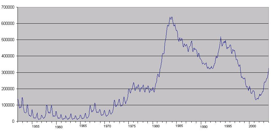 Zelfgemaakte grafiek van werkloosheid in Nederland - gebaseerd op cijfers van het CBS. Ik geef het vrij voor het publieke domein. Johan Lont 20 dec 2004 13:54 (CET)